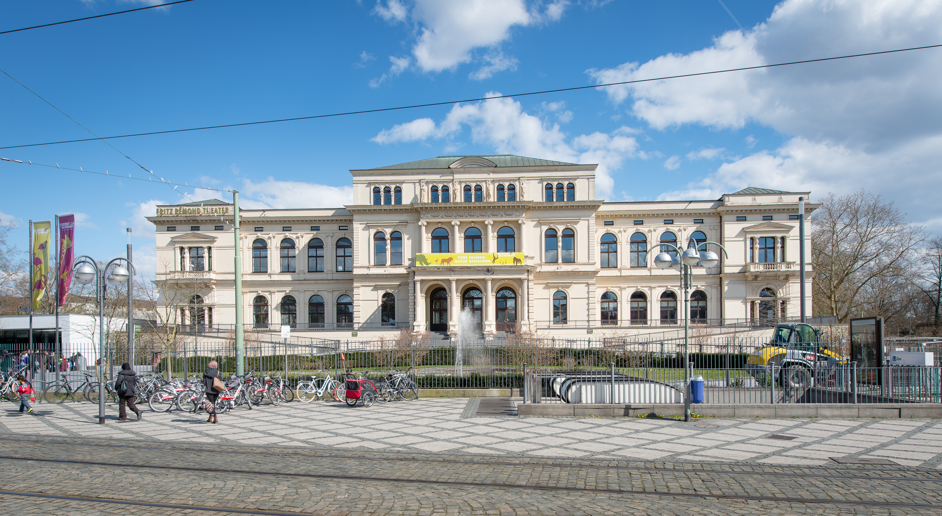 Zoologischer Garten Frankfurt, 1876 errichtetes Zoogesellschaftshaus, u.a. Spielstätte des Fritz Rémond Theater